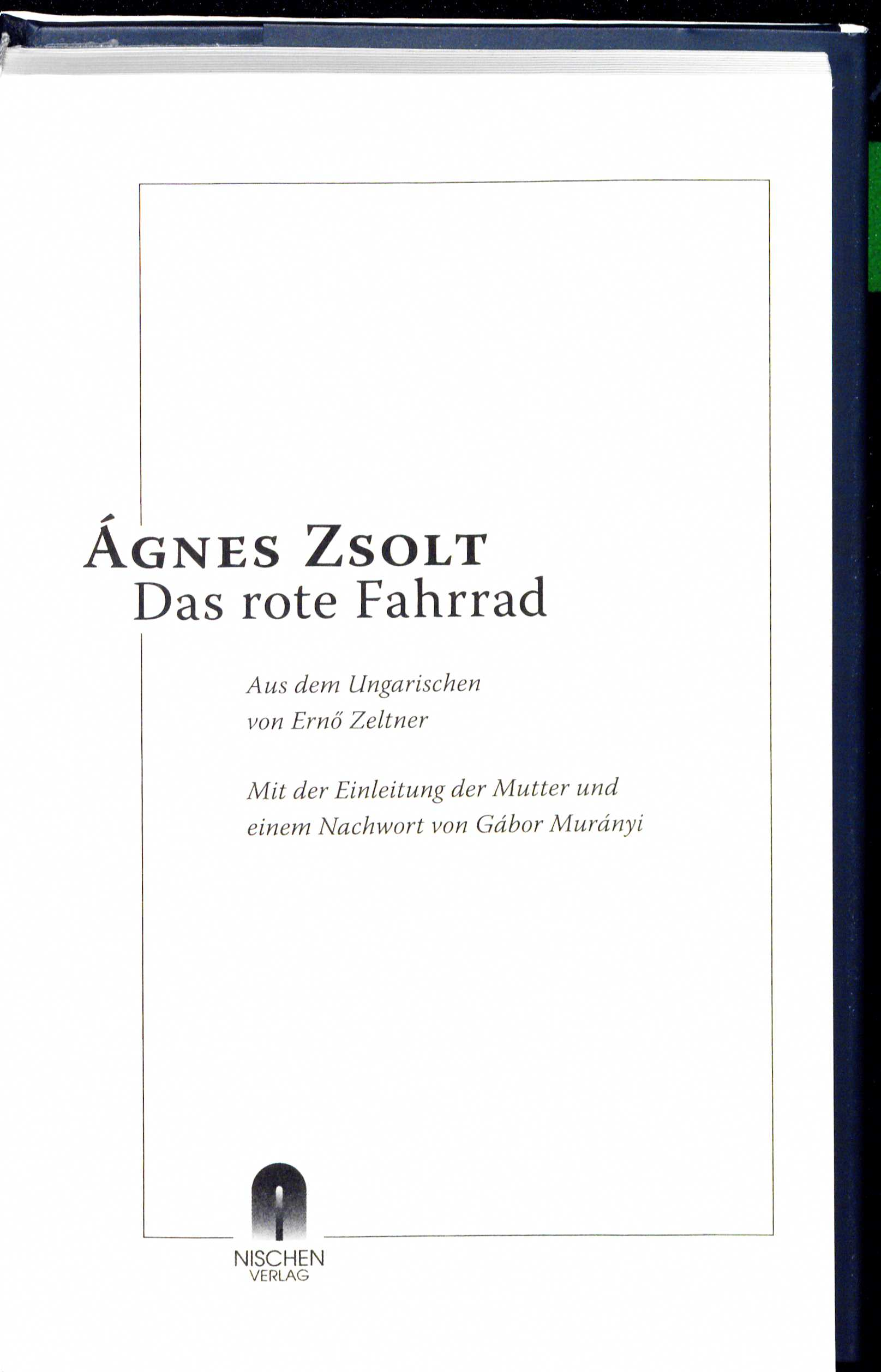 Ágnes Zsolt Das rote Fahrrad 2012 Titel. Tagebuch von Éva Heyman aus dem Jahr 1944